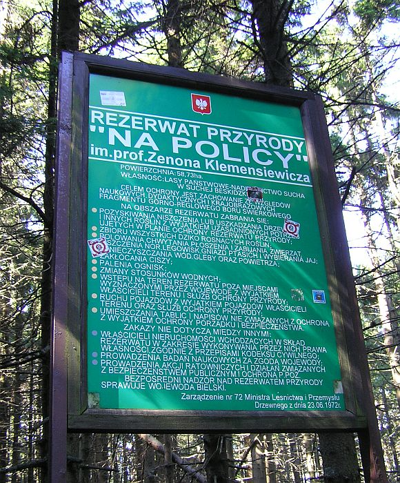 Rezerwat Na Policy im. prof. Klemensiewicza w Zawoi